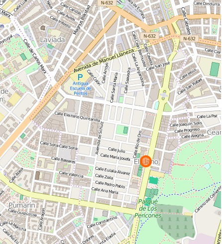 EL LLANO